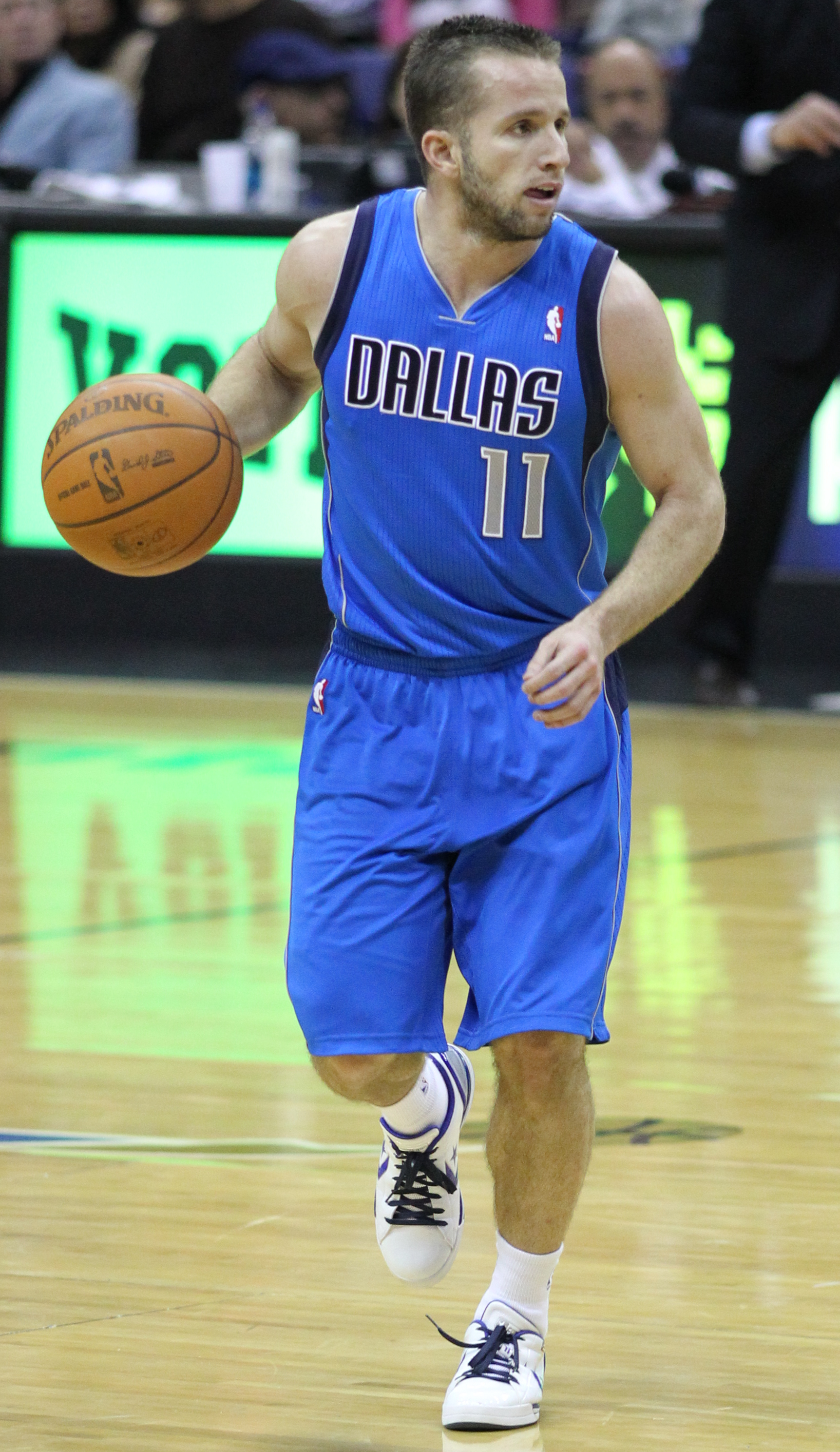 Wizards v/s Mavericks 02/26/11